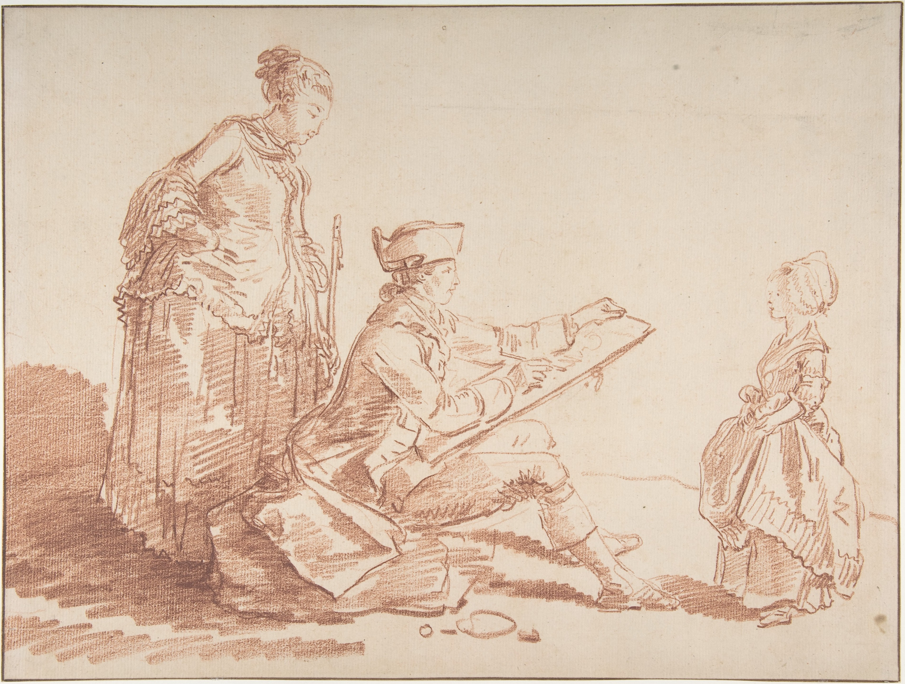 Drawing; Drawings